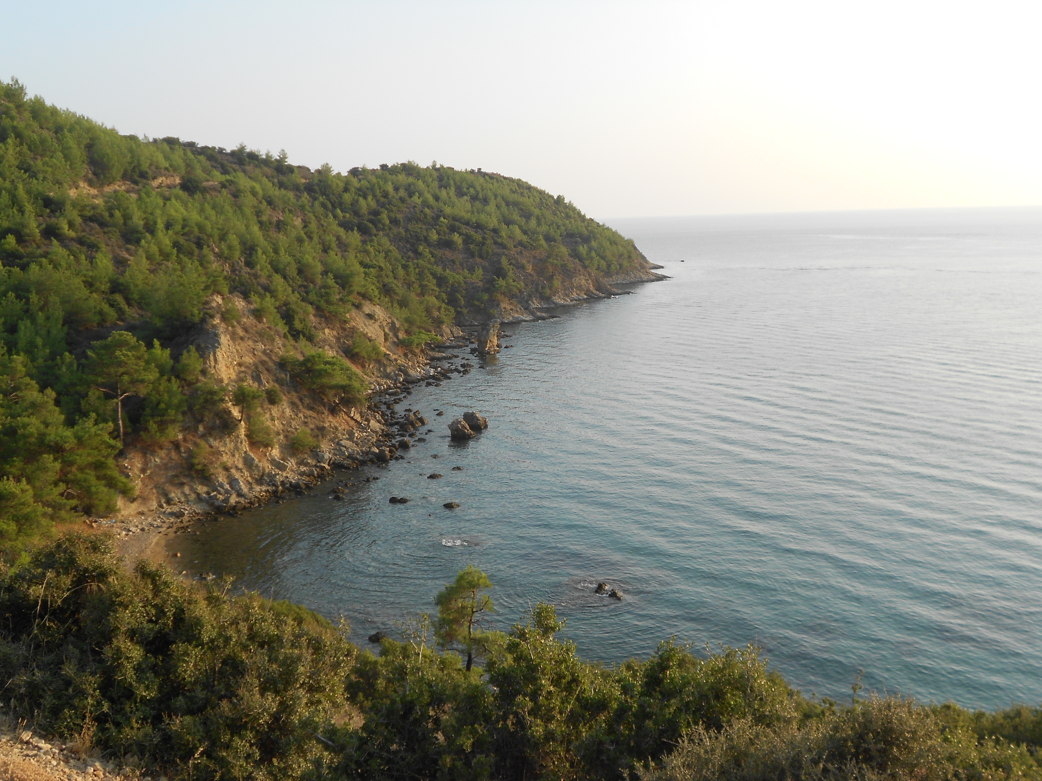 Драган Цветковић Ниш сопствена слика Тасос Грчка 2013 Једна од усамлјених плажа на Тасосу Licensing